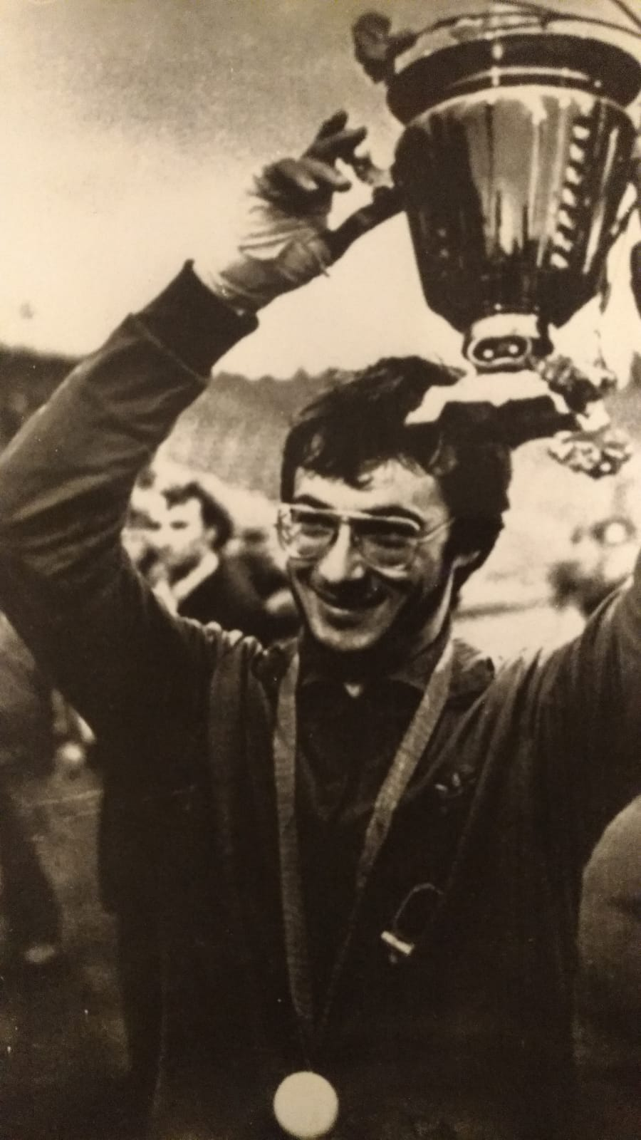 Roberto Tozzi. 400 metri, Campionati europei juniores di atletica. 1977 a Donetsk